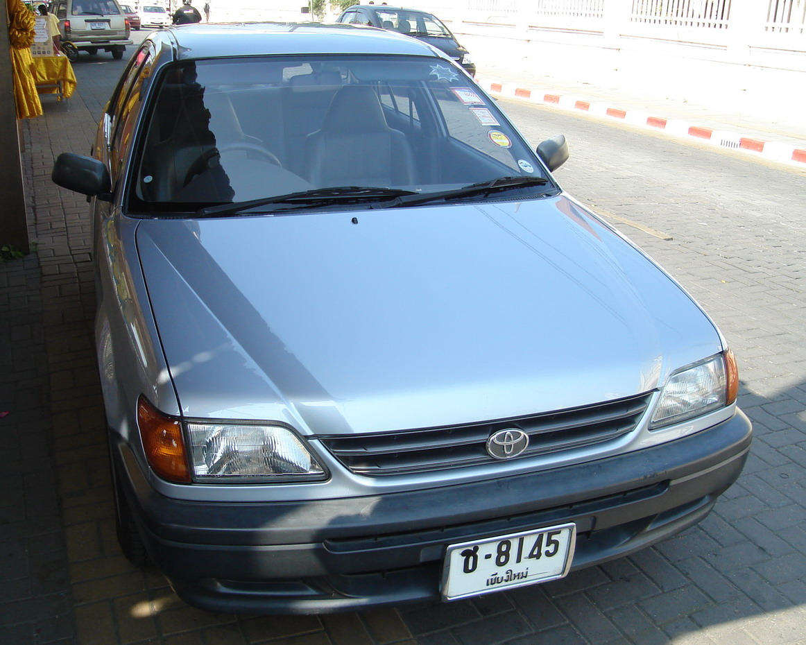 Toyota Soluna -- Chiangmai, Thailand